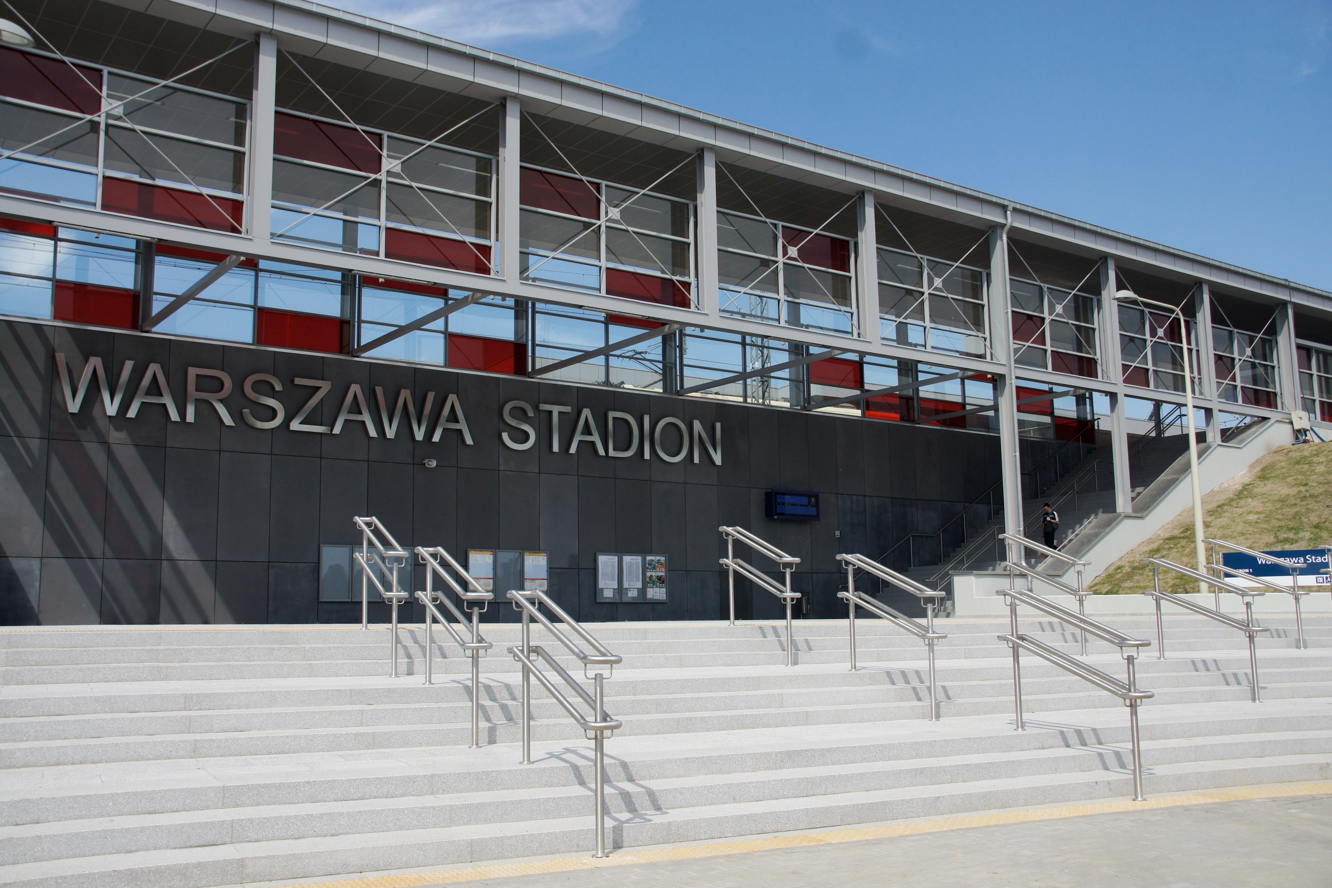 Stacja Warszawa Stadion - 05.05.2012 - dzień otwarcia po remoncie